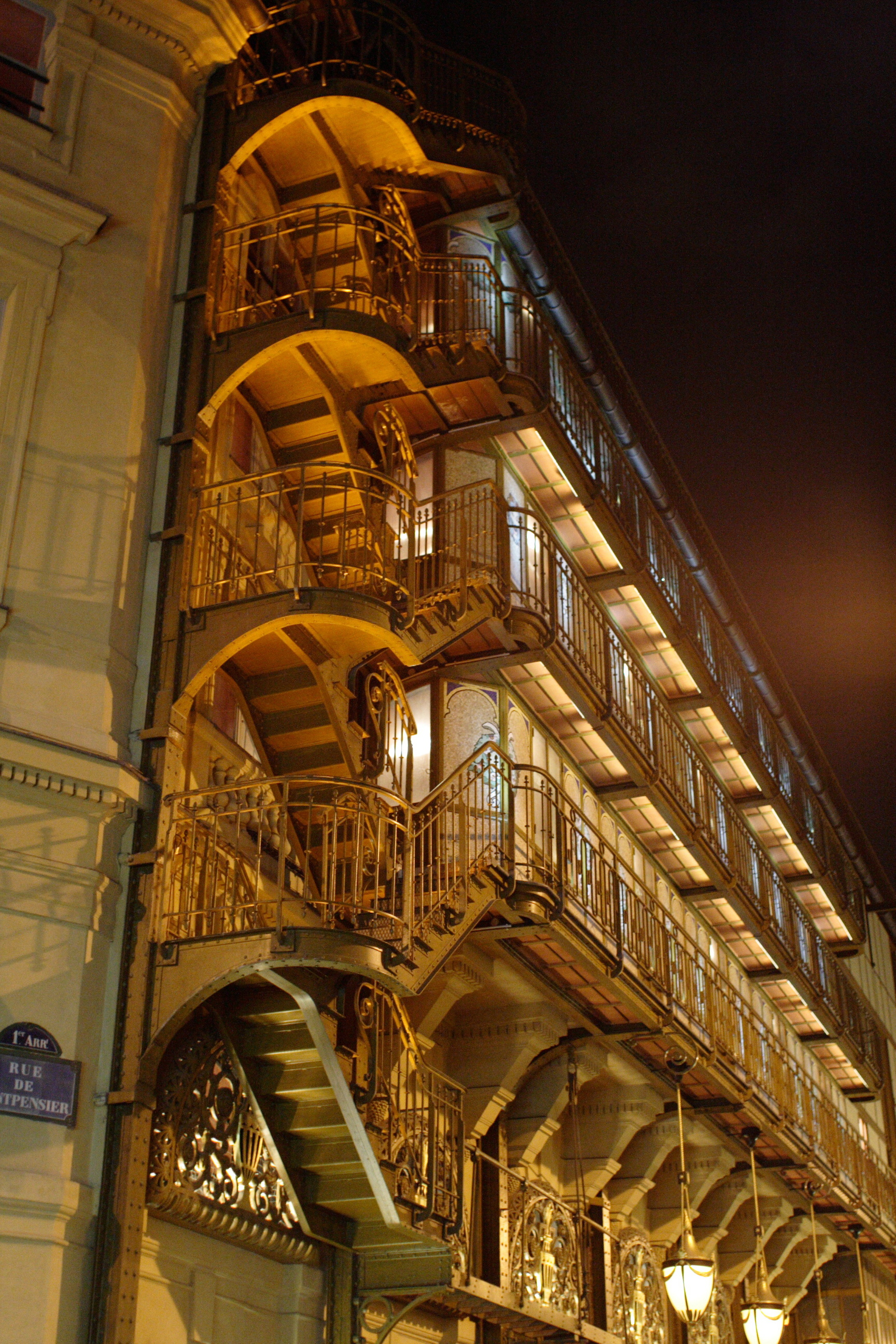 Théâtre du Palais-Royal, Paris, escalier en façade.